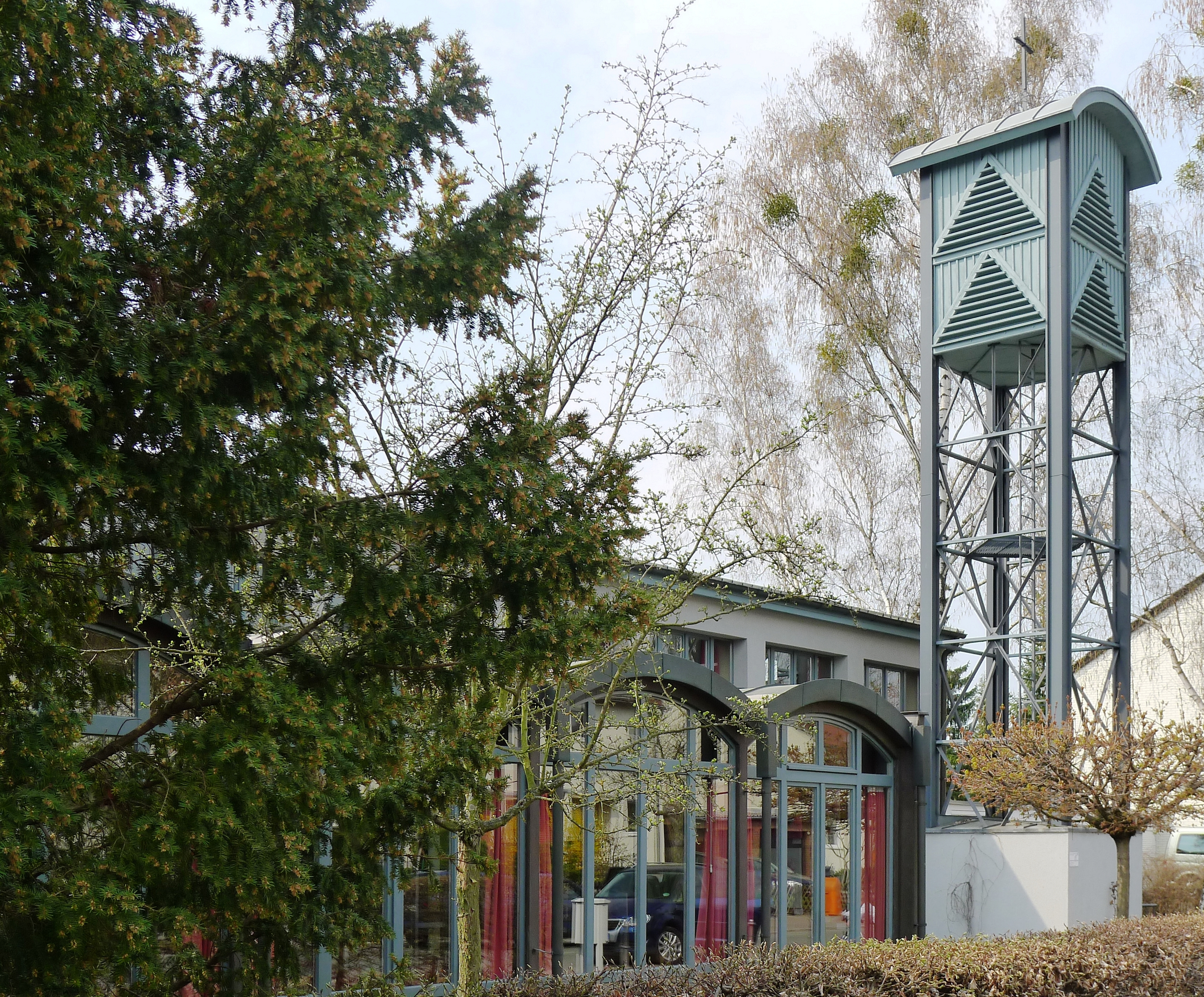 Eingangsbereich der Kirche und Campanile